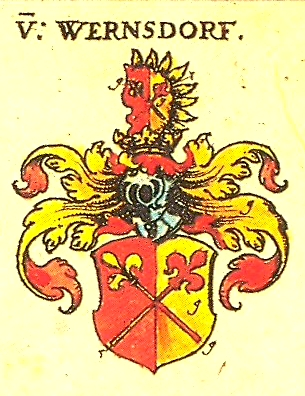 Wappen des meißnisch-schlesisch-preußischen Adelsgeschlechts von Wernsdorff.